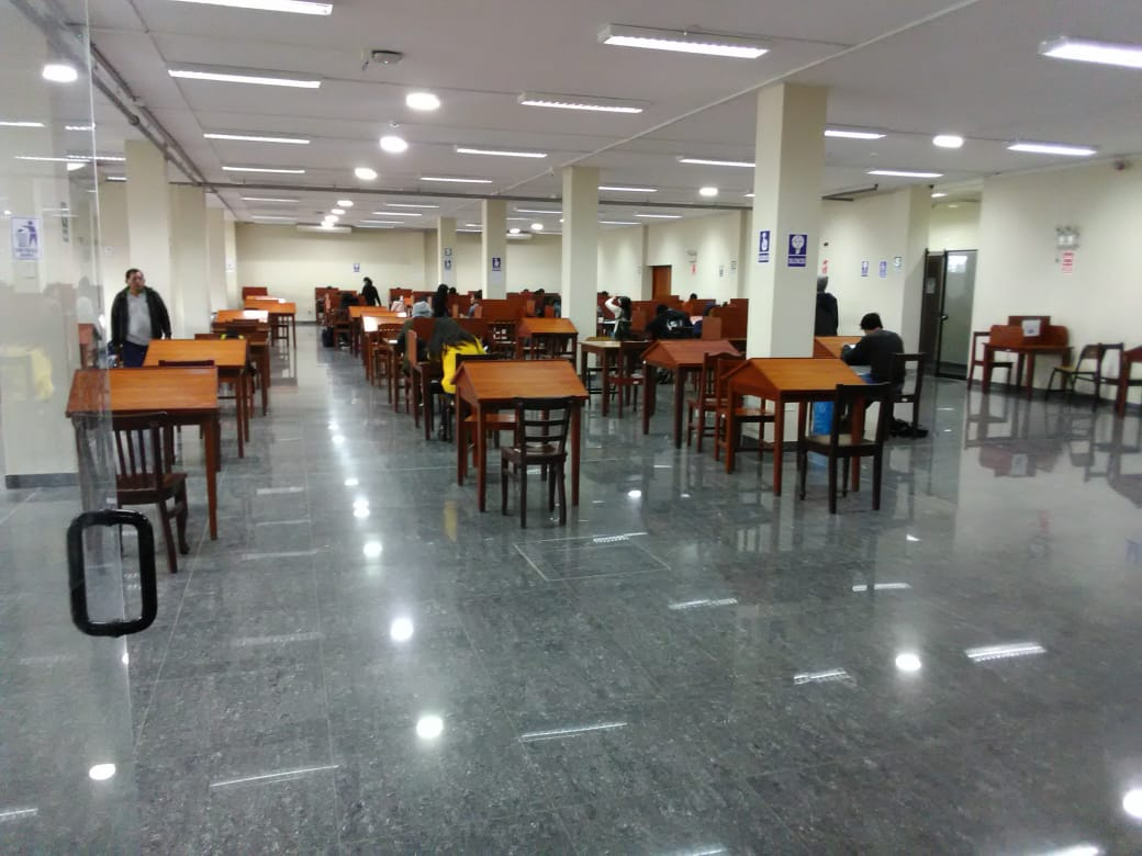 Biblioteca de la Facultad de Derecho y Ciencia Política de la UNMSM